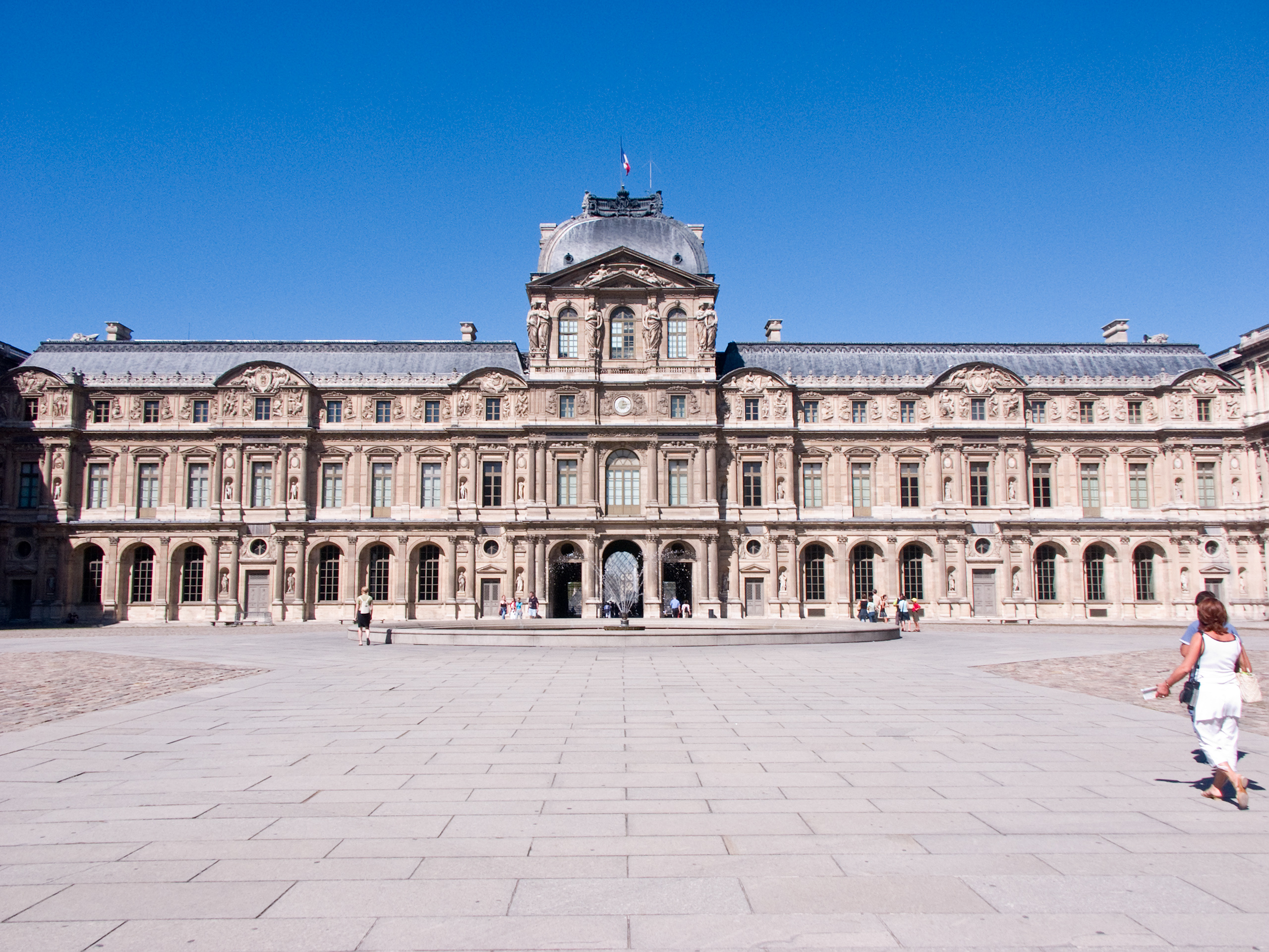 Musée du Louvre, Pavillon de l'Horloge avec l'aile Lescot à gauche et l'aile Lemercier à droite.